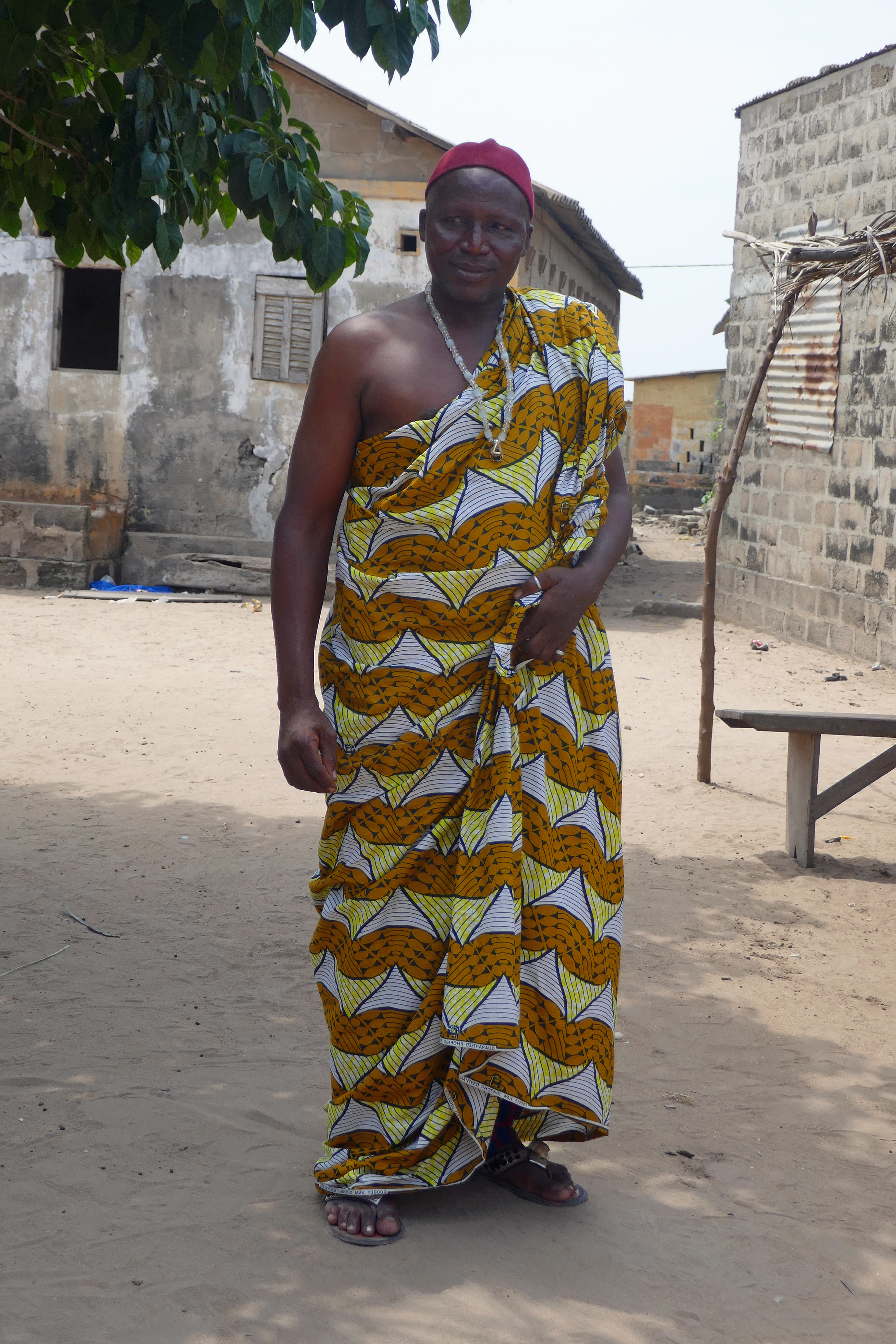 Hévé (Grand-Popo, Bénin) : Sa Majesté Méto Ahoussan Hélékétché Alifa, roi des Xwla, intronisée le 28 janvier 2011.